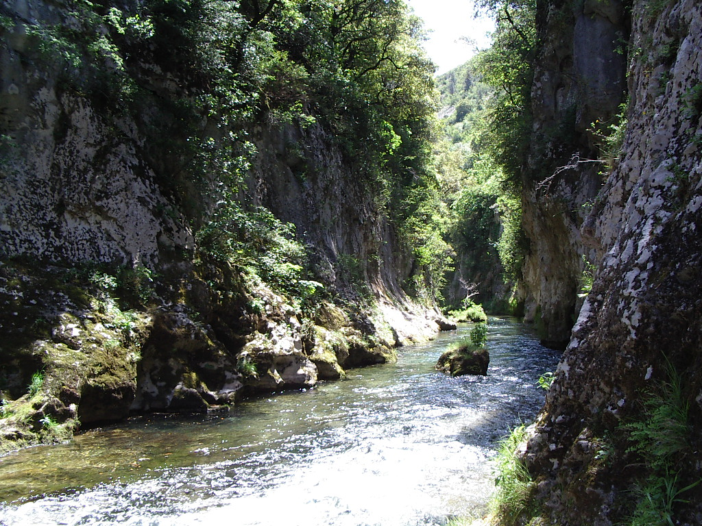 la Vis en aval de la Foux